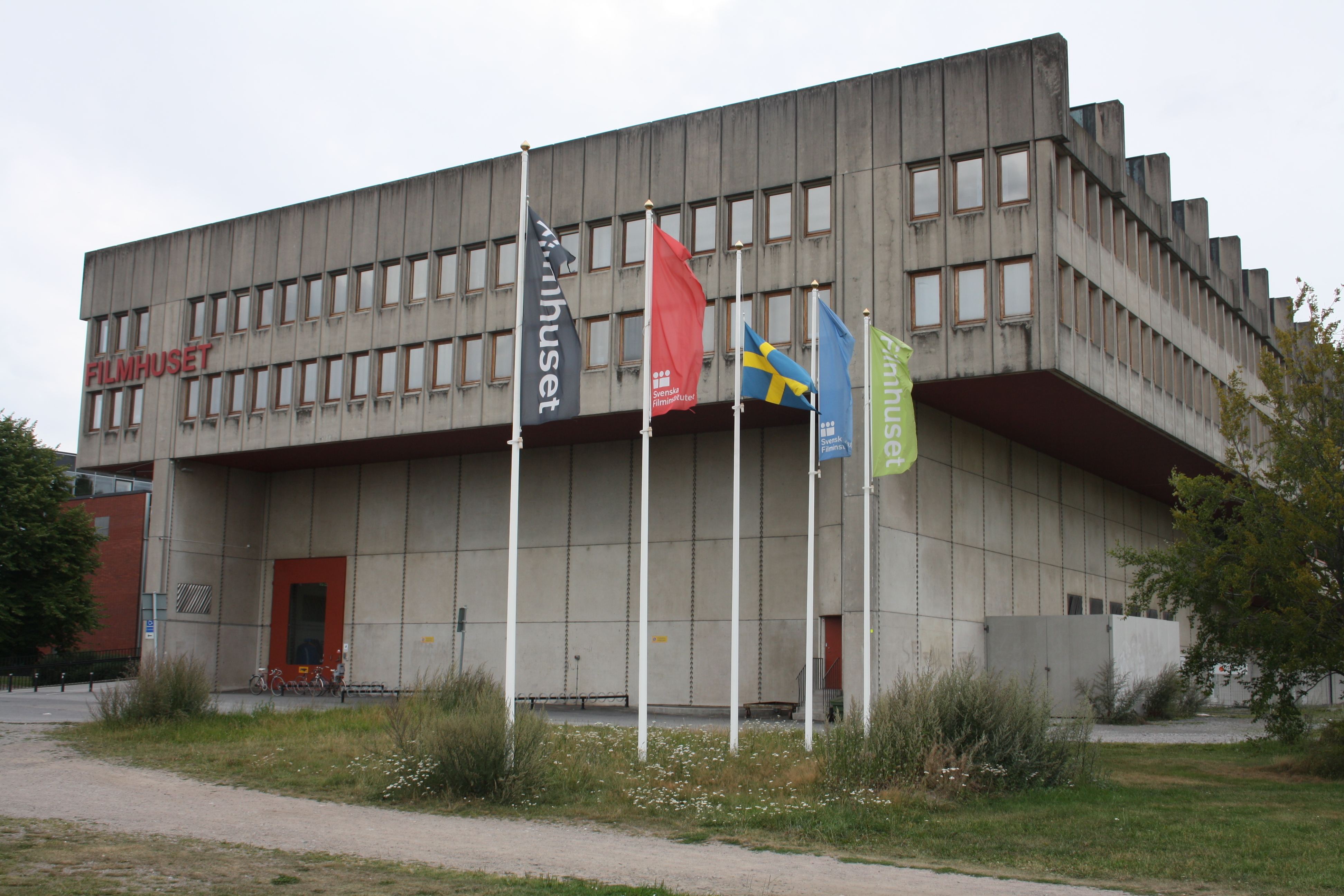 Filmhuset i augusti 2016